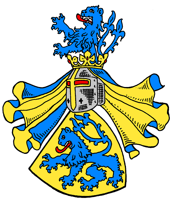 Wappen derer von Stein zu Lausnitz